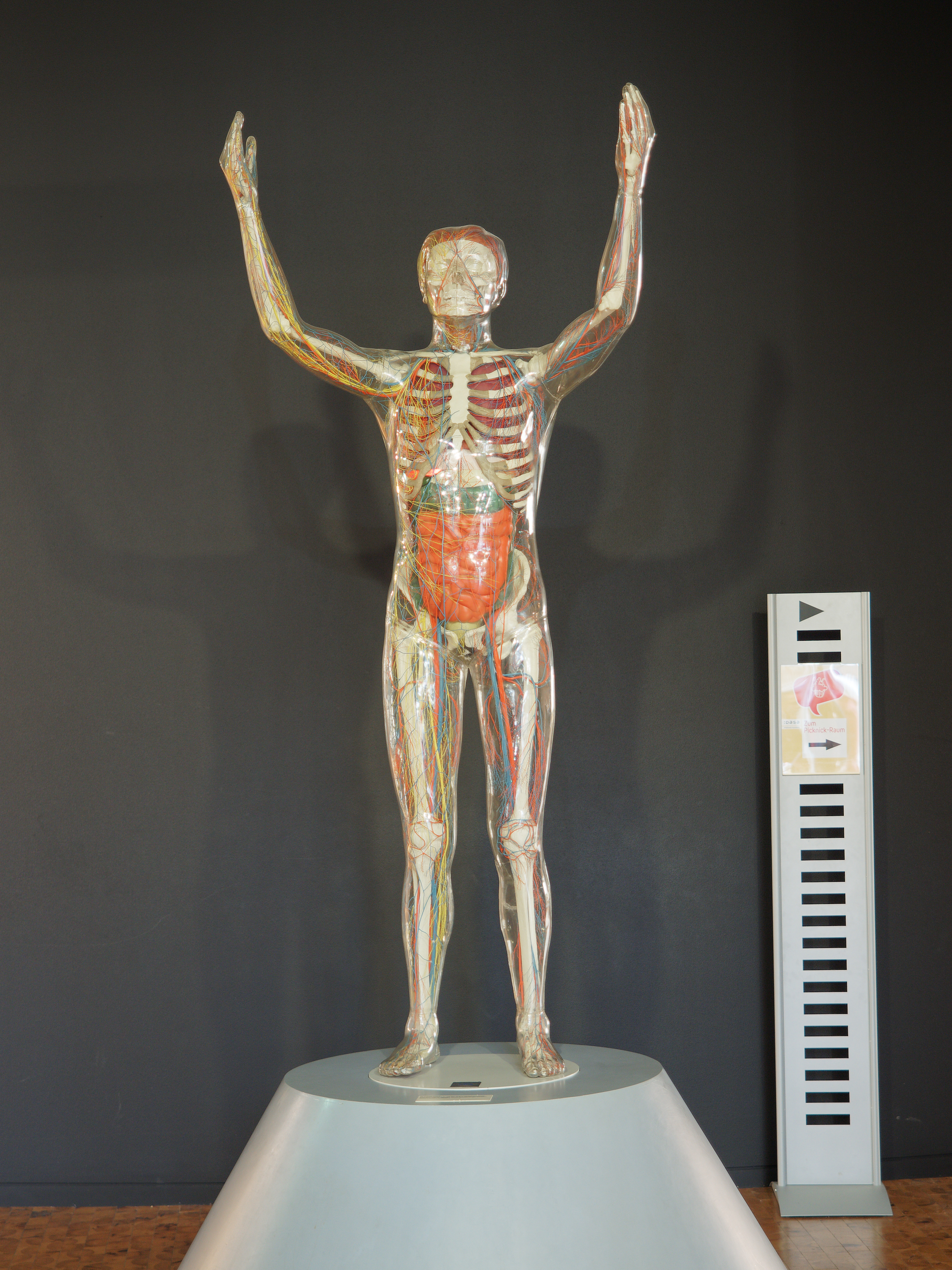 Dortmund, gläserner Mensch mit der Nachbildung der Organe, Blutgefäße (rot, blau) und Nerven (gelb) in der DASA (Deutsche Arbeitsschutz Ausstellung). Ansicht von vorn. Die rechte Körperhälfte enthält Arterien, Nerven und das Hauptvenennetz, die linke Körperhälfte Arterien und Venen. Die inneren Organe leuchten verschiedenfarbig in nachstehender Reihenfolge auf: Gehirn, Kehlkopf, Schilddrüse, Lungen, Herz, Milz, Magen, Bauspeicheldrüse, Leber, Gallenblase, Dünndarm, Blinddarm, Dickdarm, Mastdarm, Nieren, Harnblase. Hergestellt in der Lehrmittelfabrik GmbH im Deutschen Hygiene-Museum 1992.